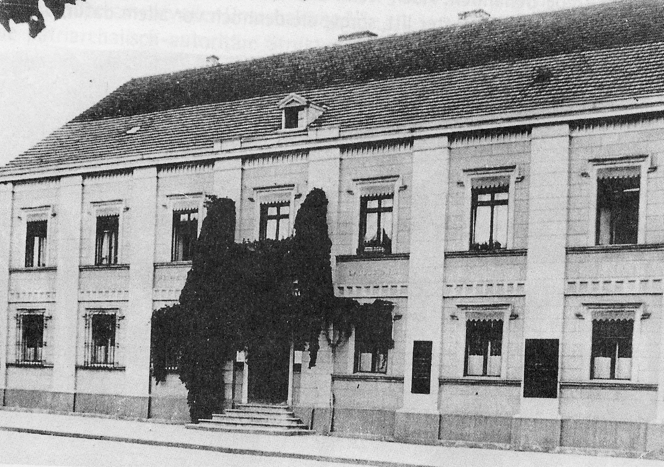 Piła - dom rodzinny Carla Goerdelera